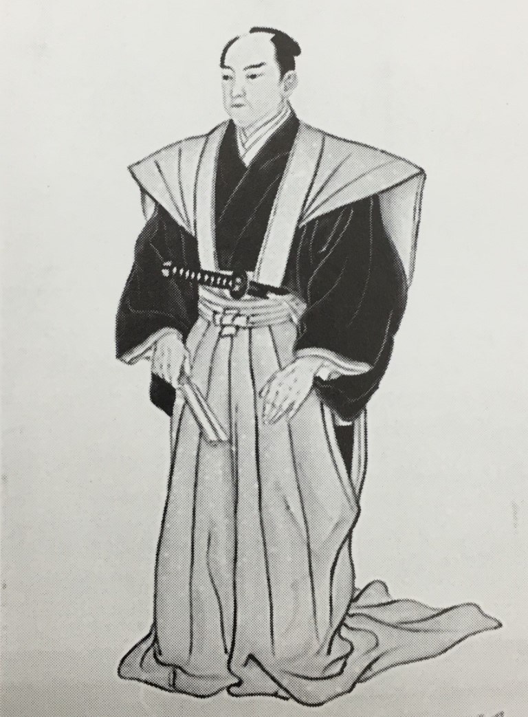 内藤政樹の肖像(モノクロ)。